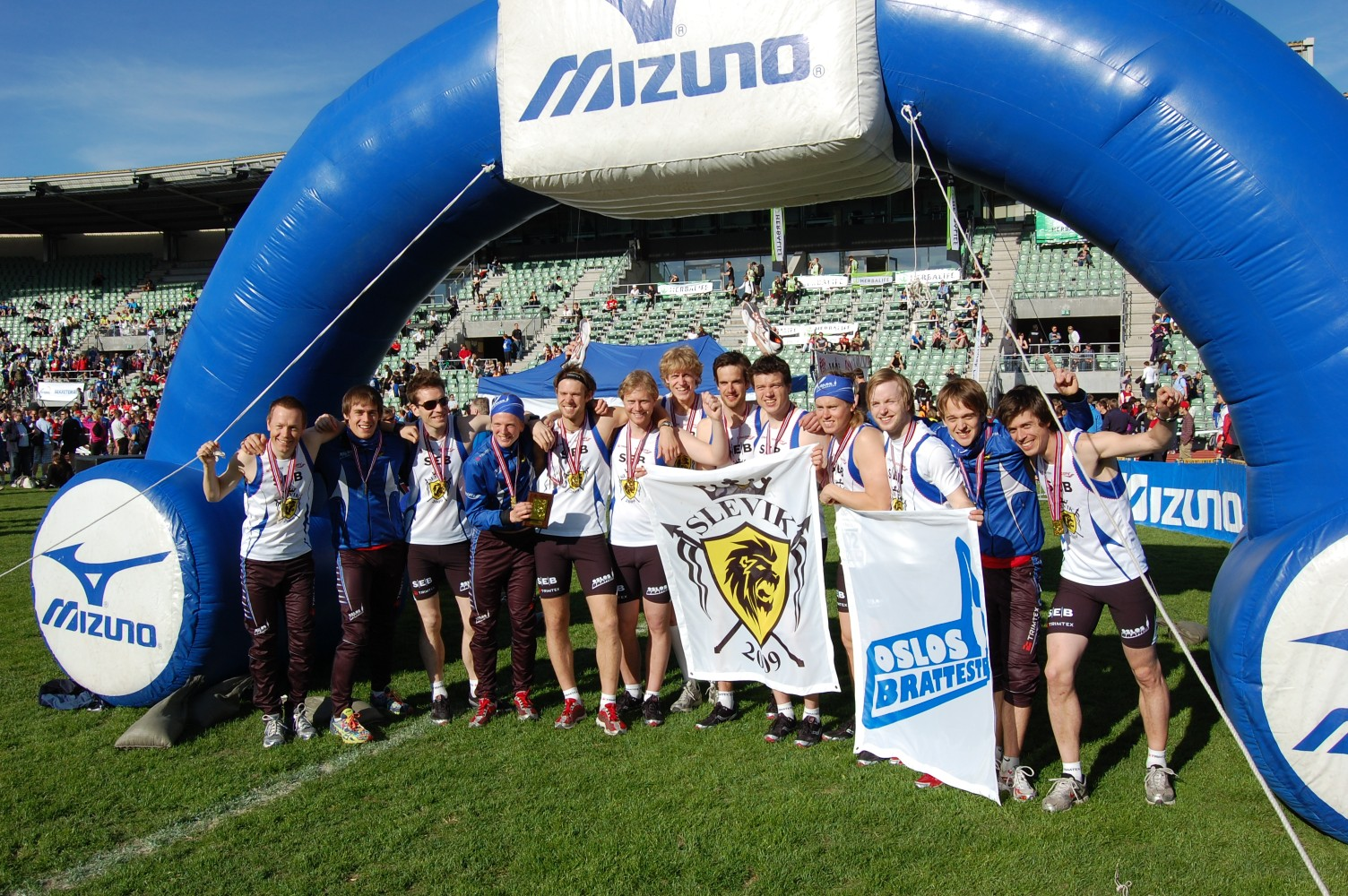 Slevik ILs vinnerlag i Holmenkollstafetten 2010.